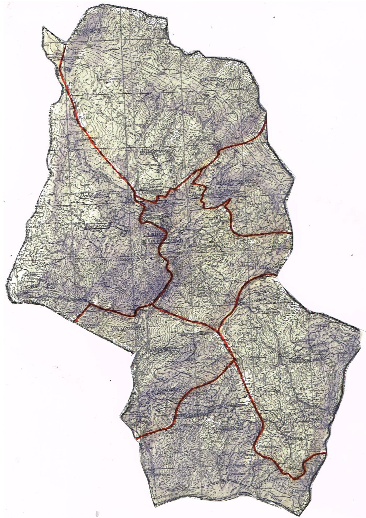 Cartina